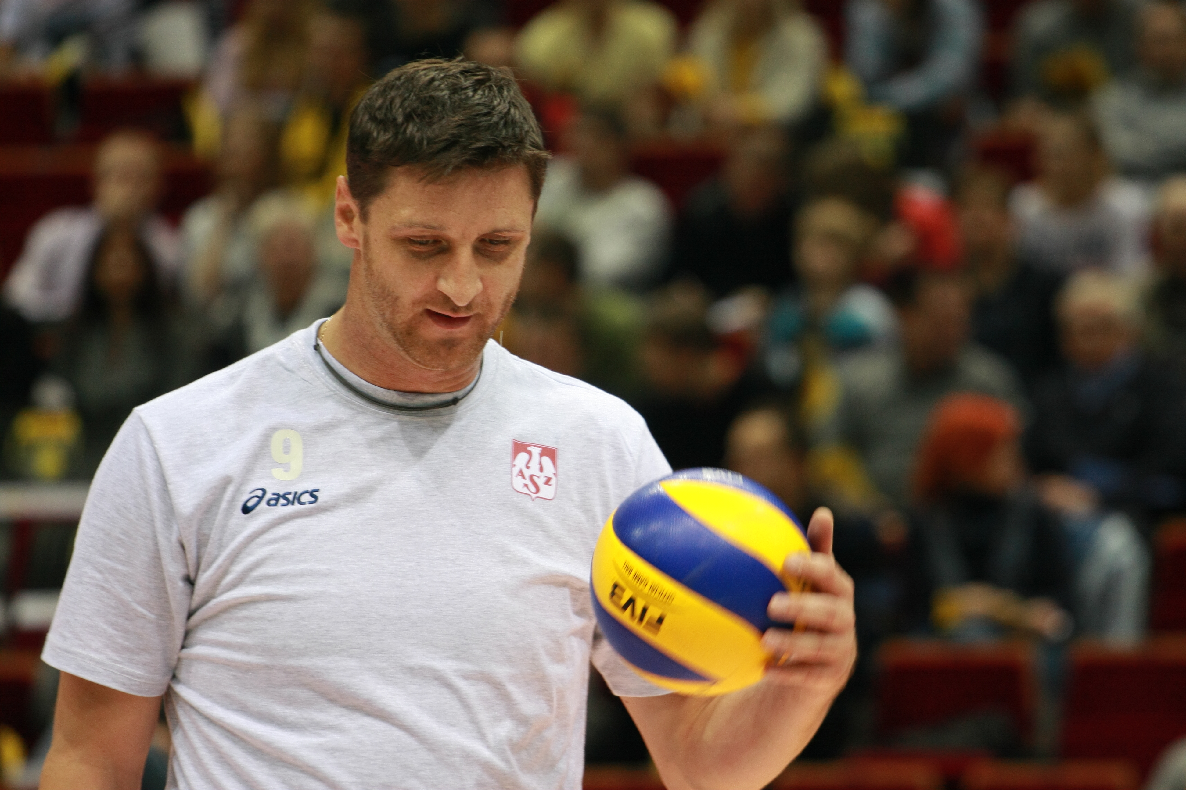 Piotr Gruszka